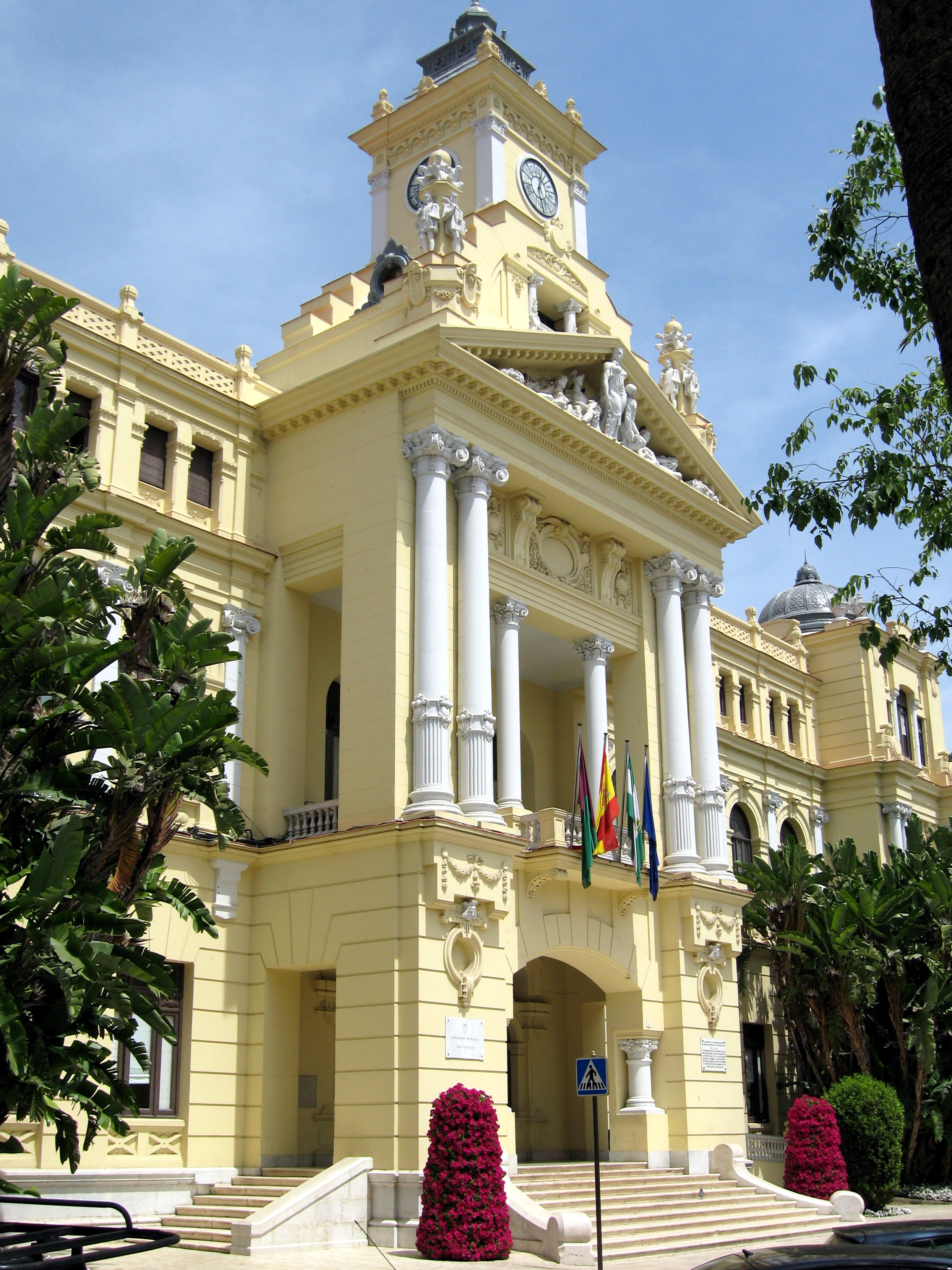 Rathaus von Málaga (Ayuntamiento de Málaga), Andalusien, Spanien